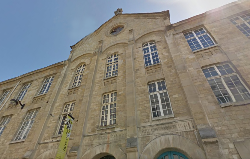 Façade du temple de Plaisance, 95 rue de l'Ouest 75014 Paris